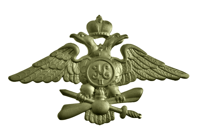 Эмблема на погоне авиационного офицера Российской империи